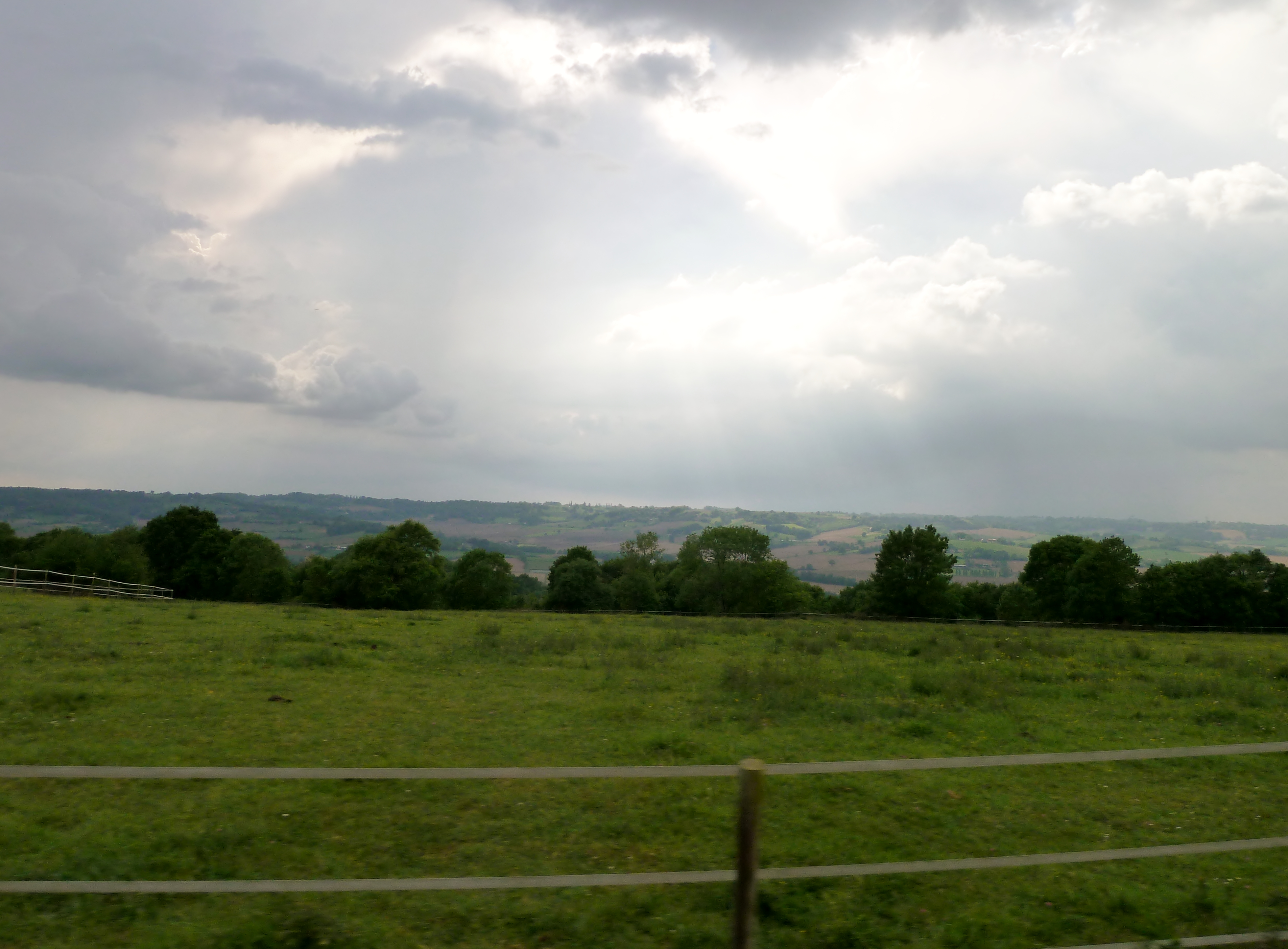 Paysage depuis Arricau-Bordes